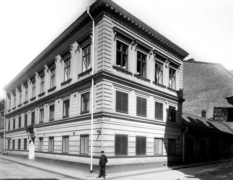 Hörnet av Stora Badstugatan 22 och Tunnelgatan. Pro Patrias barnbördshus Referenser Upphov: Larssons Ateljé. Tid: Maj 1915 Beteckning: Fotonummer C 954